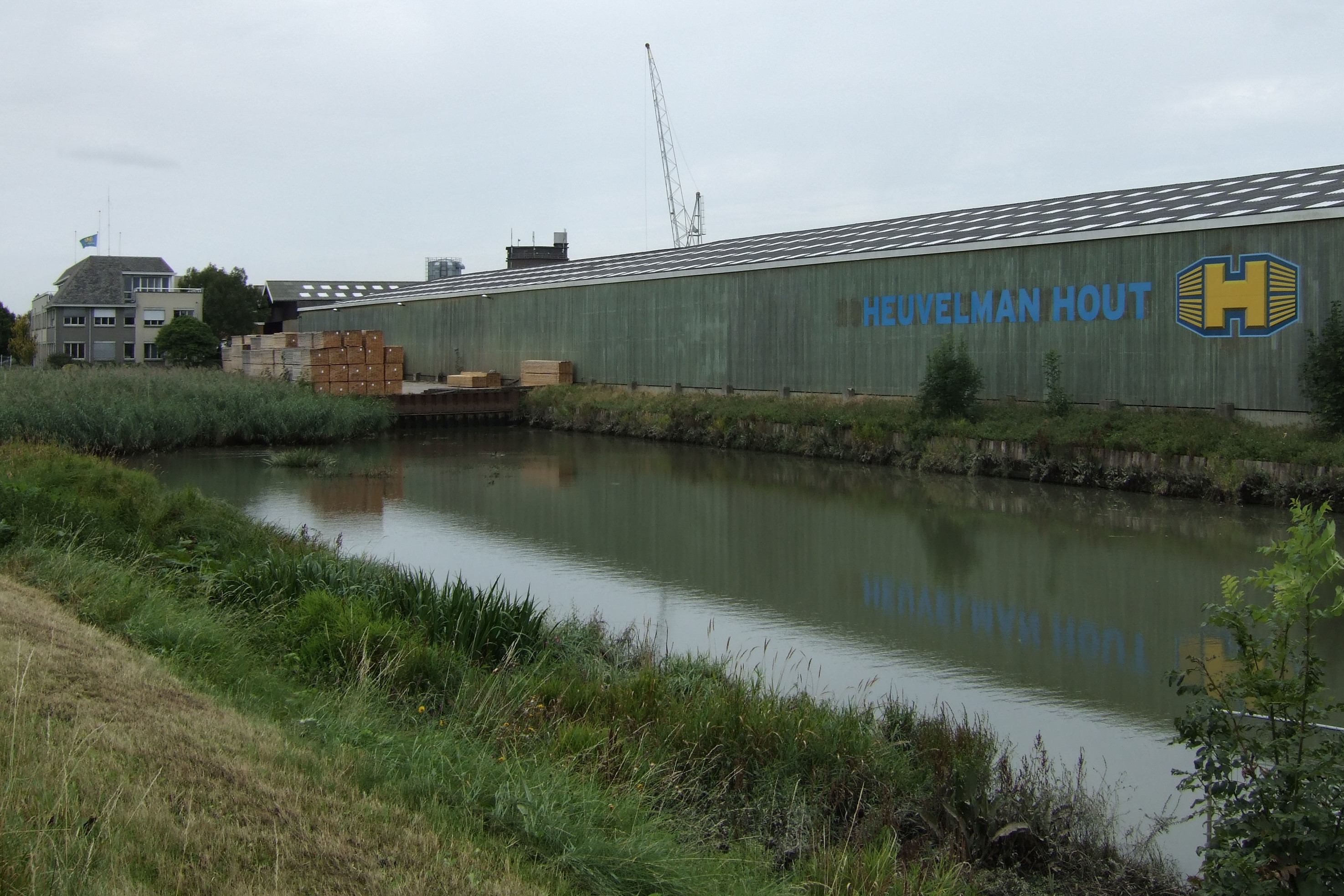 Zicht op Heuvelman Hout in Ouderkerk aan den IJssel